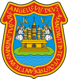 Escudo de Armas de la Ciudad de Puebla, en México. Fue dado a la ciudad por el emperador Carlos V de España, por eso las iniciales en el escudo (Karolus V). La imagen del castillo de cinco torres hace referencia a la opulencia de la ciudad, mientras que los angeles sujetando un liston hacen referencia a la leyenda del trazado perfecto de la ciudad. La leyenda en torno al escudo esta escrita en latín y dice "ANGELIS SVIS DEVS MANDAVIT DE TE VT CVSTODEANTE IN OBNIVS TVIS VIIS" Angelis suis Deus mandavit de te ut custodeante in obnibus tuis viis (Dios mandó a sus ángeles para que te cuiden en todos tus caminos)